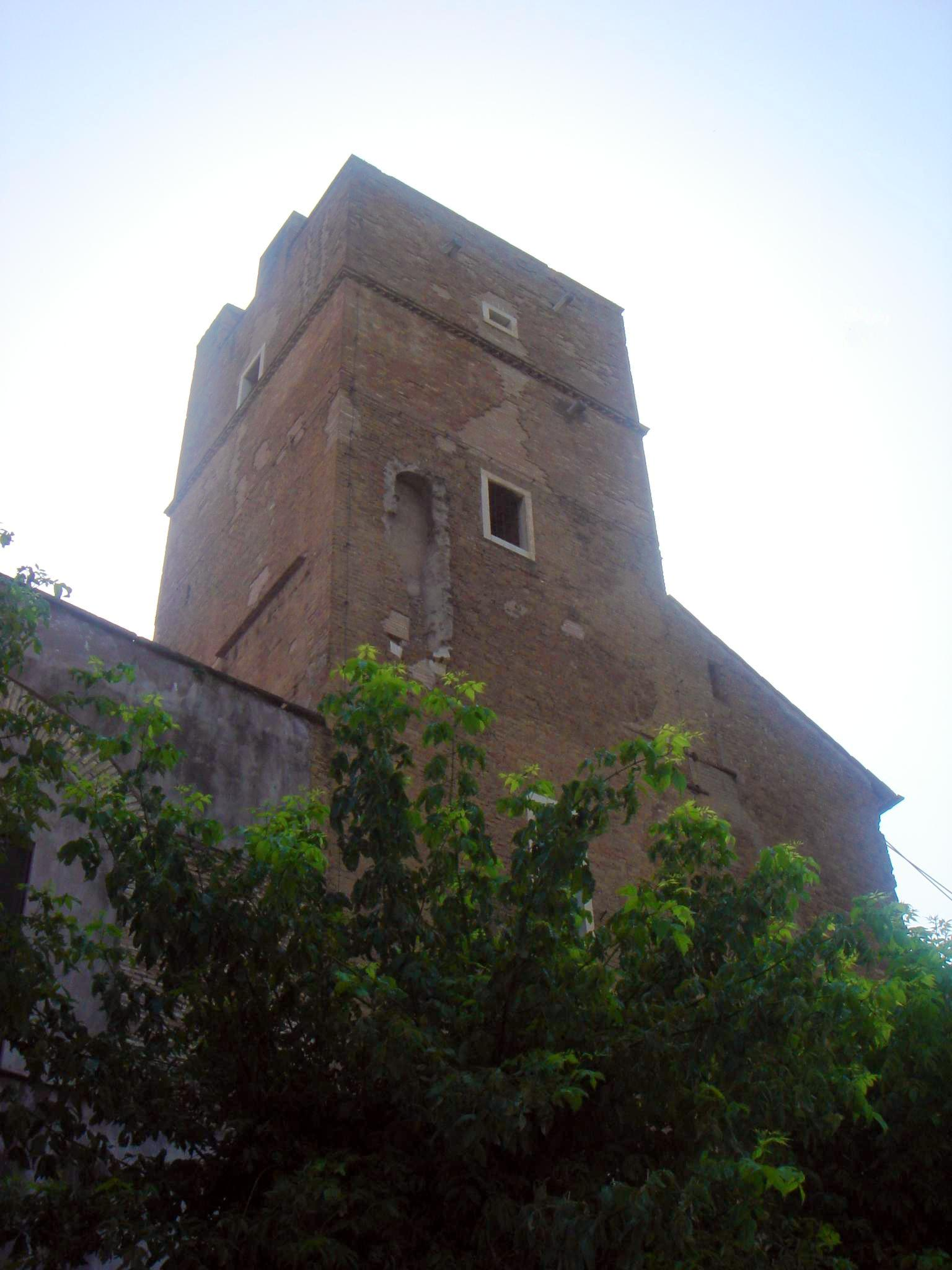 Torre del convento fortificato. Foto by Lalupa.